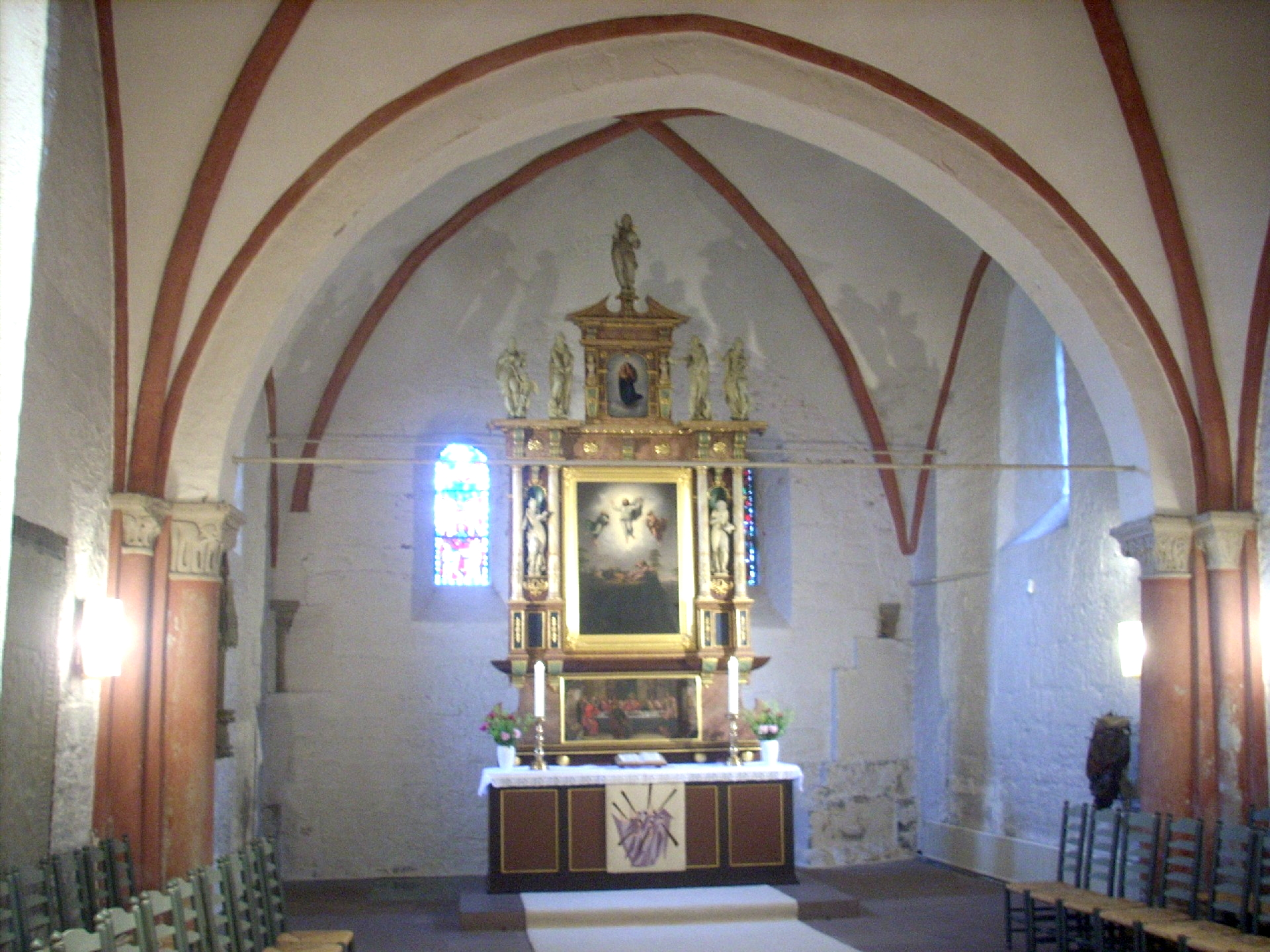 Nordenham-Blexen, ev.-luth. St.-Hippolyt-Kirche, Altarraum. Die sieben Figuren stammen von Ludwig Münstermann.